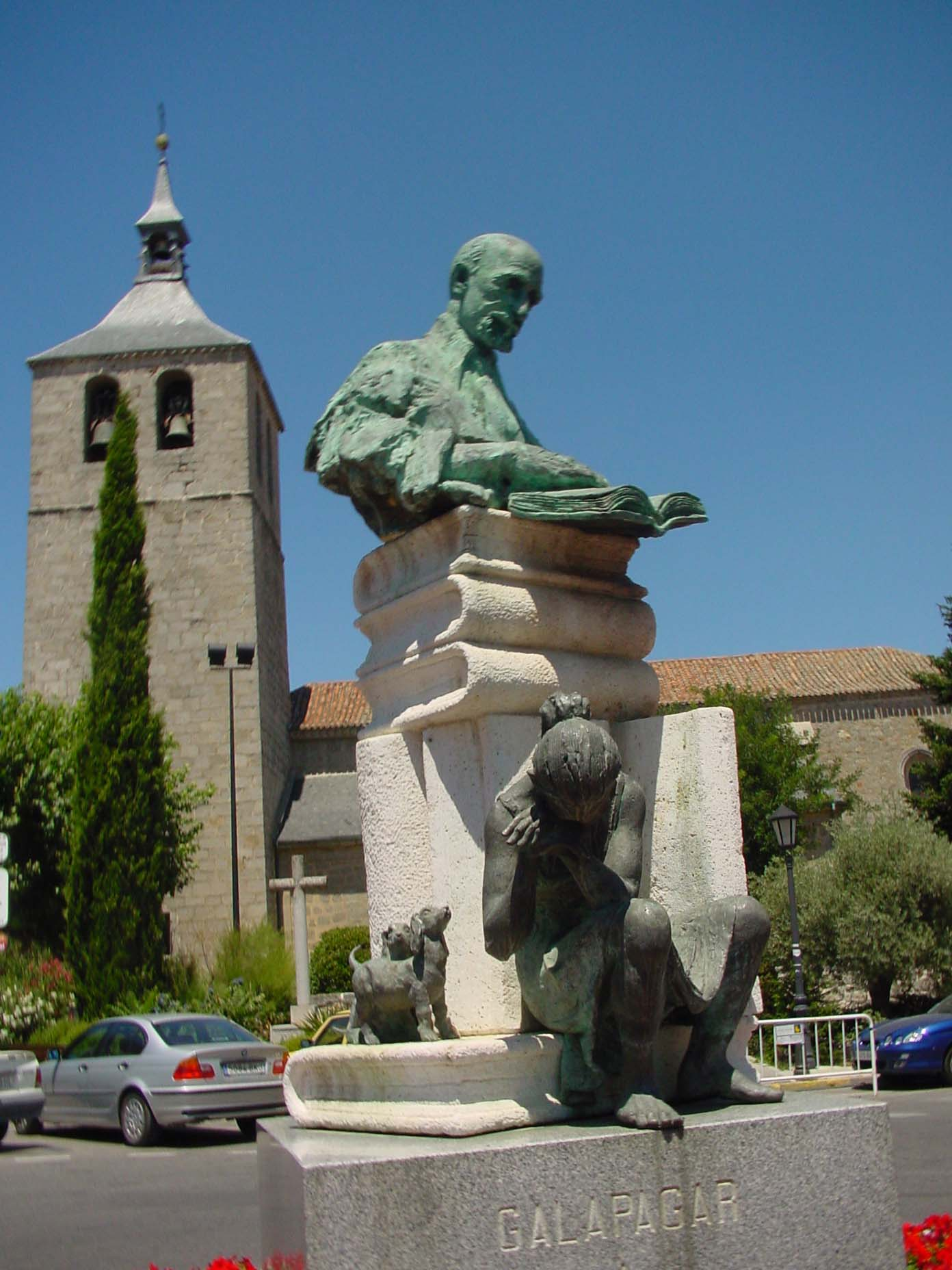 Monumento con iglesia al fondo en Galapagar.